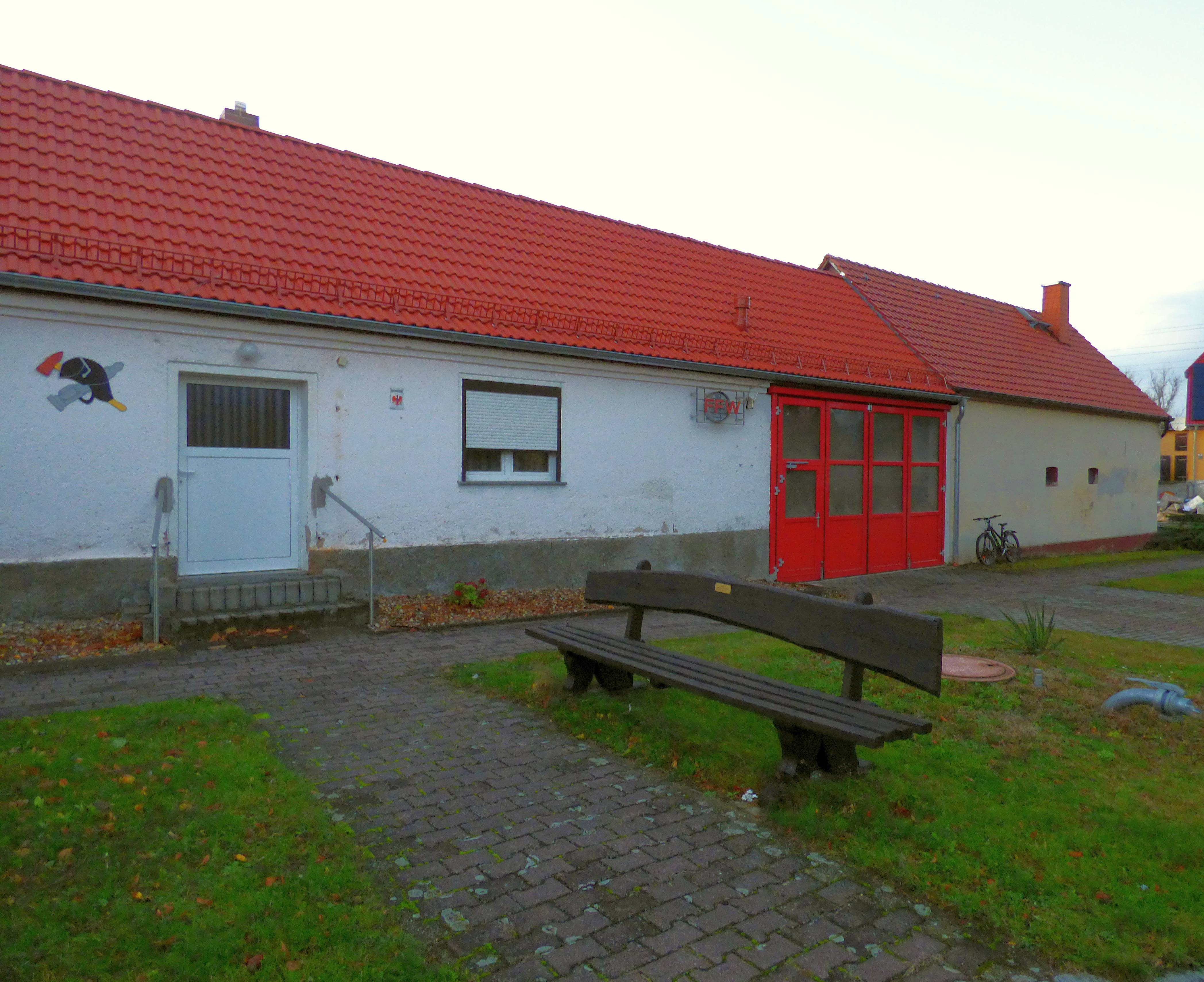 Gerätehaus der Freiwilligen Feuerwehr in Fichtenberg (Mühlberg/Elbe)